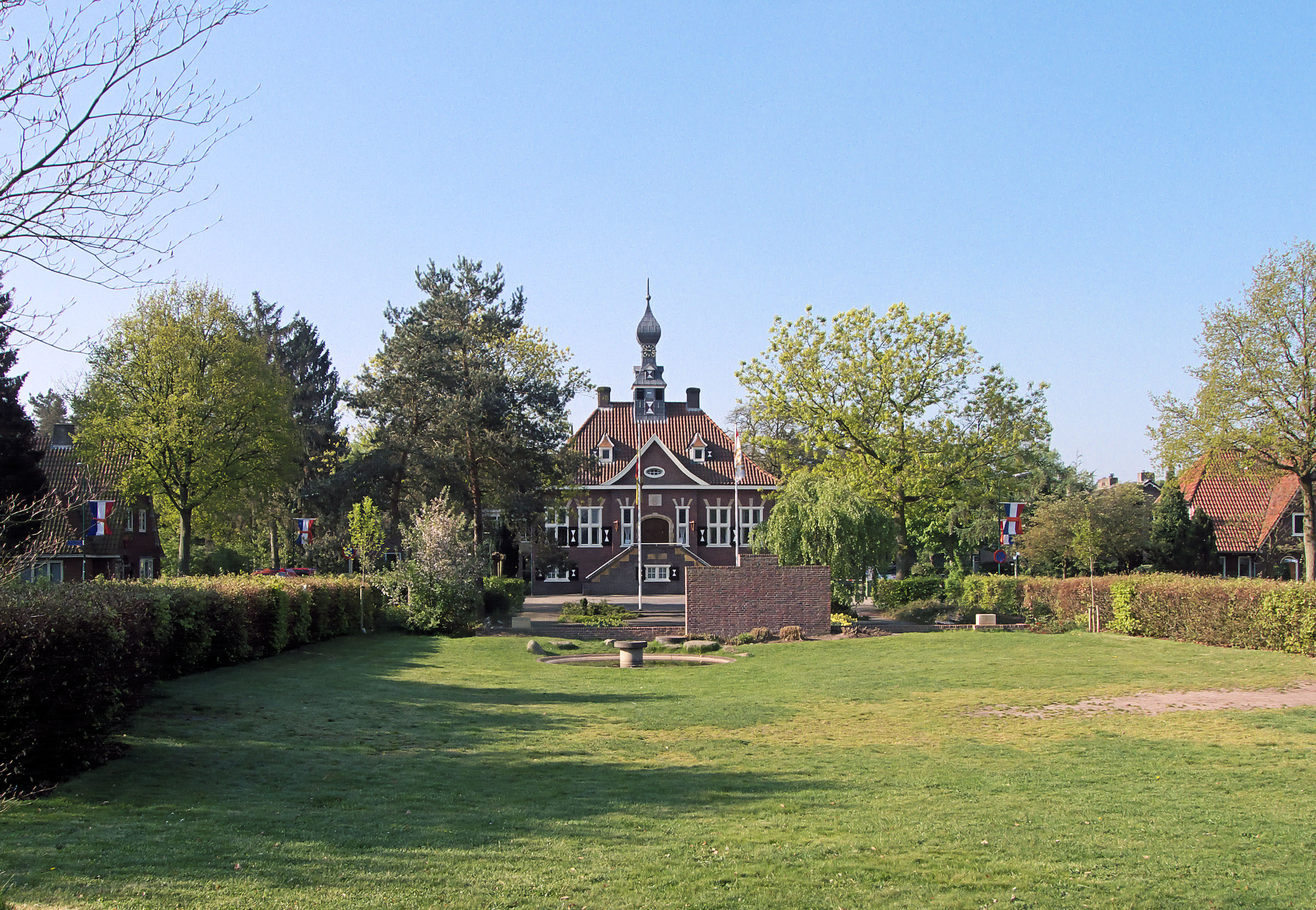 Maarn, Nederland: Voormalig stadhuis